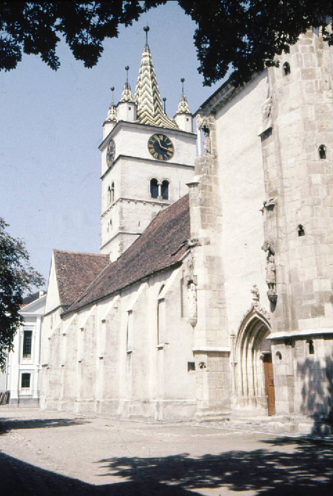 Mühlbach Stadtkirche, 1966